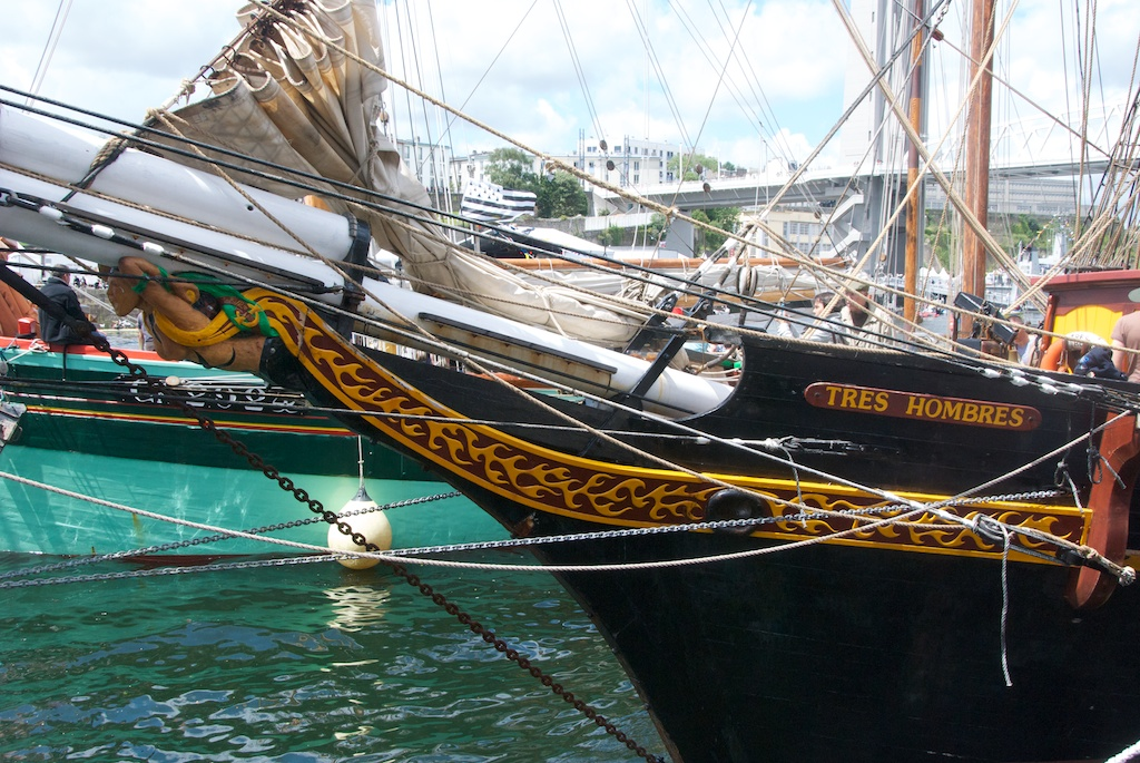 Tonnerres de Brest 2012 Figure de proue